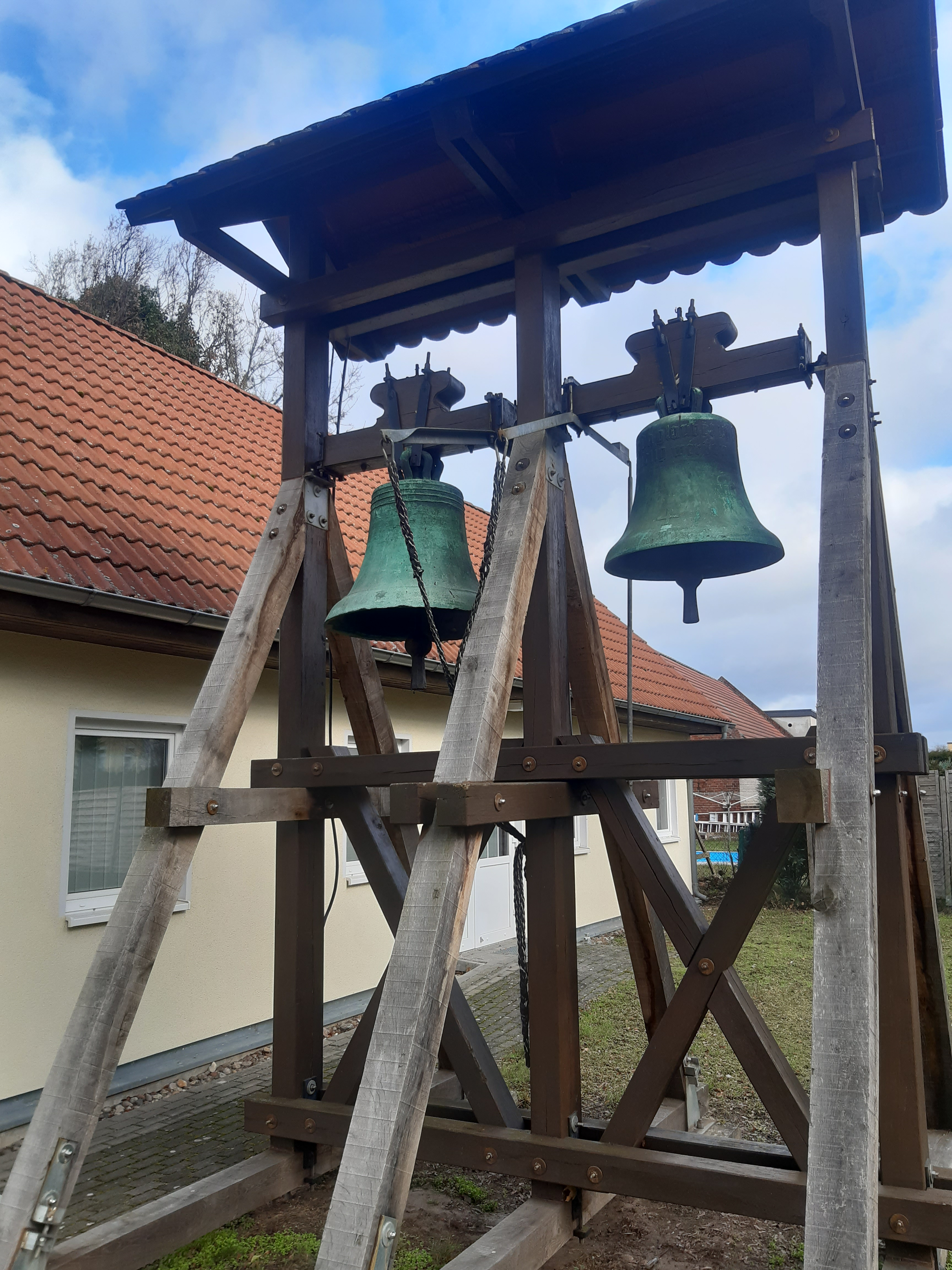 Glockenturm